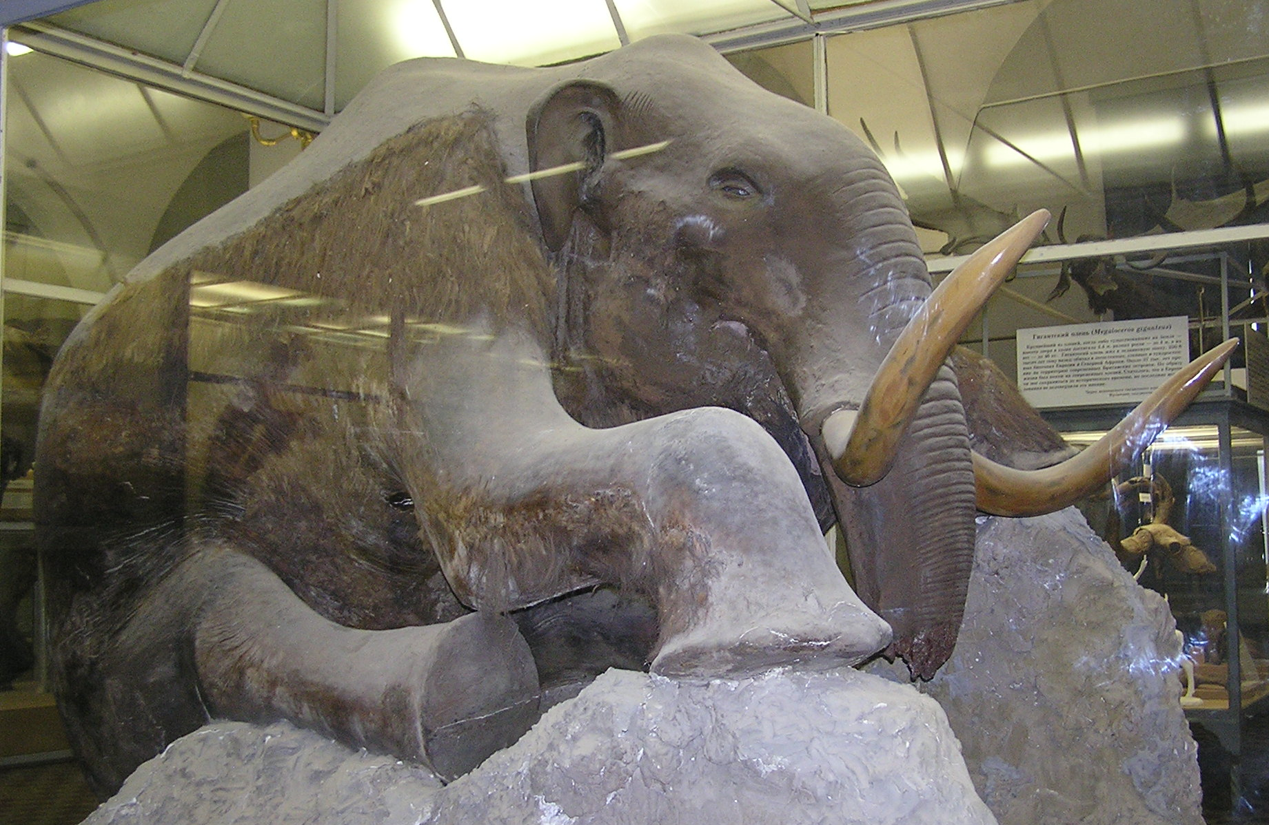 Зоологический музей в Санкт-Петербурге. Мамонт